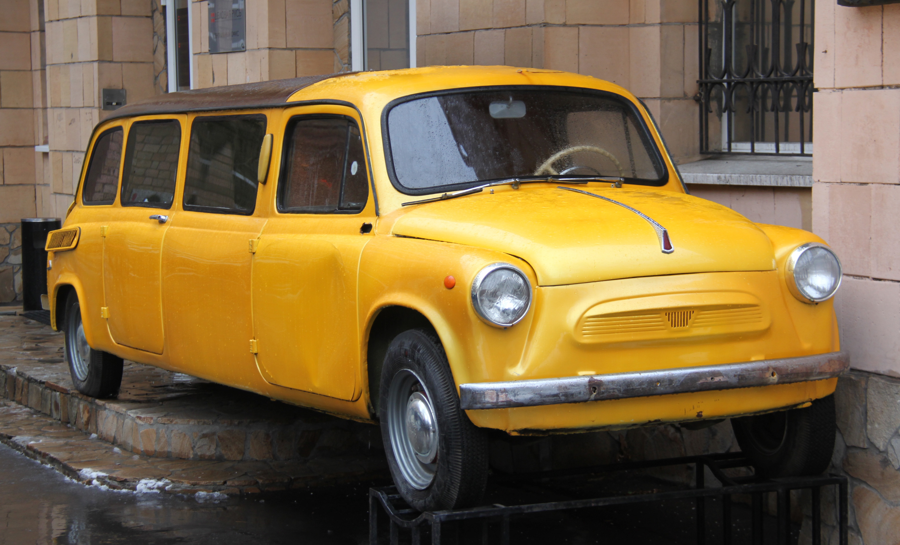 Лимузин на основе ЗАЗ-965. Москва, ул. Черняховского